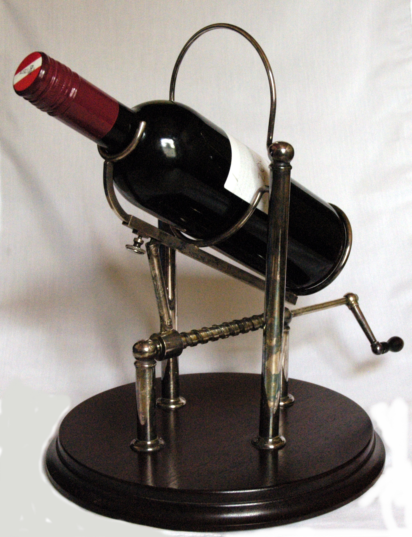 Dekantiermaschine